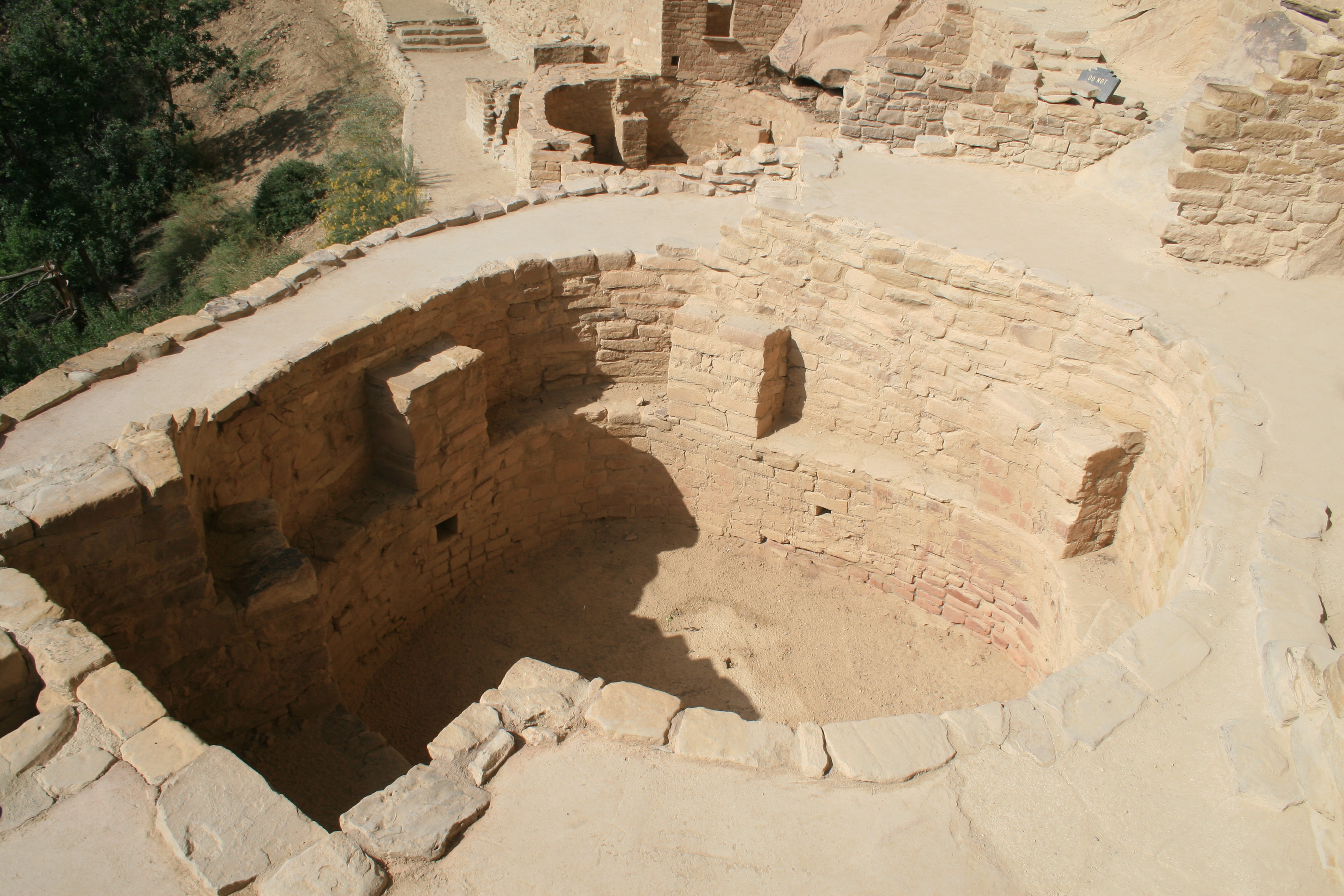 Mesa Verde National Park, Colorado Kiva at Cliff Palace.